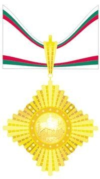 Орден "Мадарски конник"